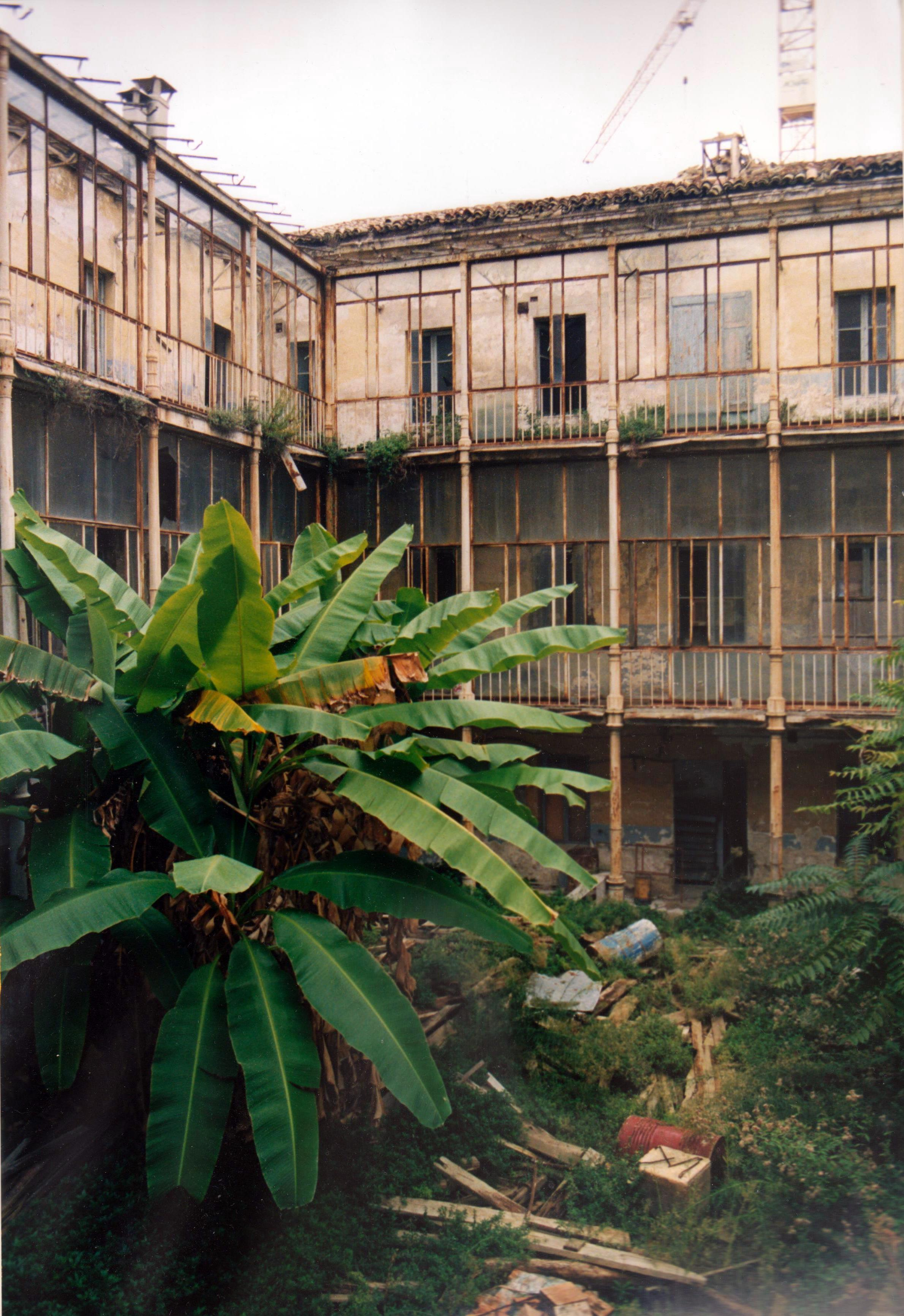 L'immagine raffigura la pianta di banano che lo scienziato anconitano Luigi Paolucci piantò tra la fine dell'Ottocento e l'inizio del Novecento, insieme ad altre piante tropicali, per fornire l'Istituto Tecnico Benincasa di un piccolo orto botanico. La foto è stata scattata durante i lavori di restauro dell'edificio, che ora ospita un pensionato per anziani.